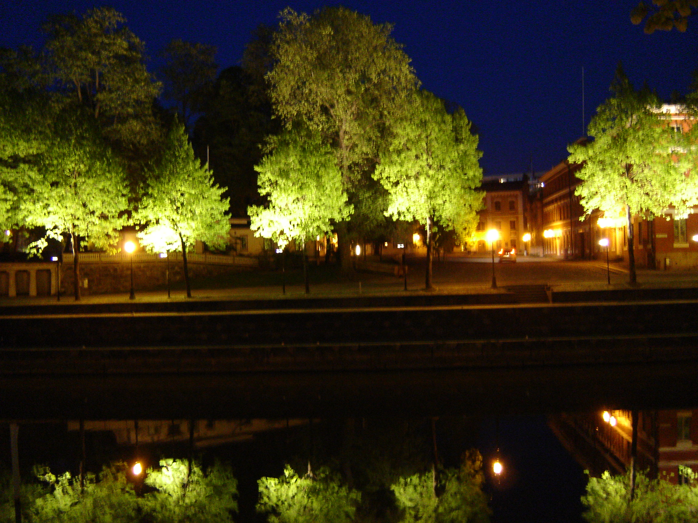 Vanha suurtori ja Pinella Linnankadulta